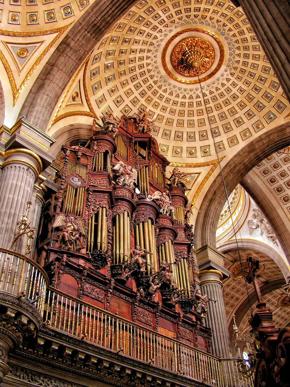 Organo de la Catedral Basílica de Nuestra Señora de la Inmaculada Concepción de Puebla — México.